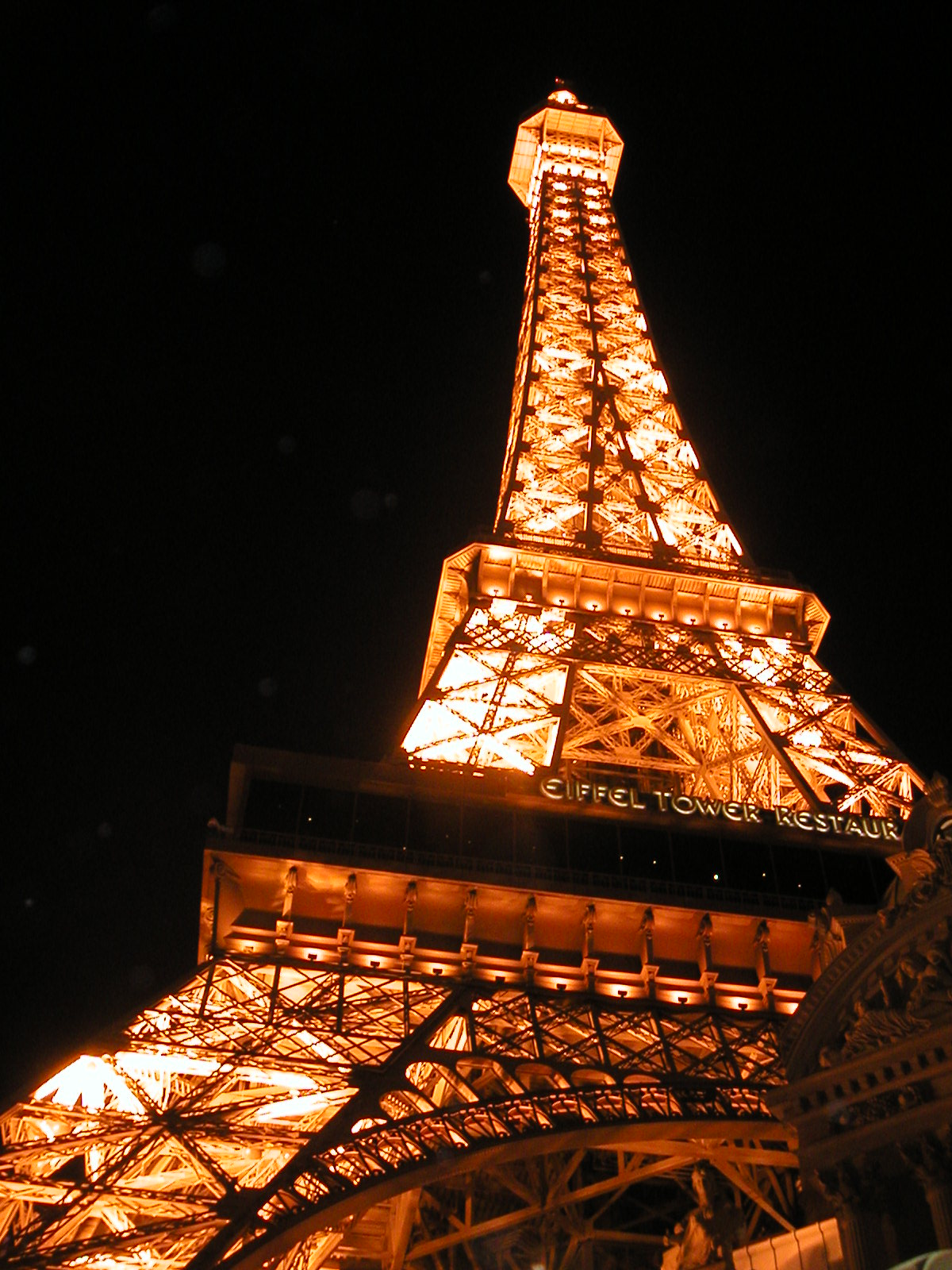 於拉斯維加斯自拍